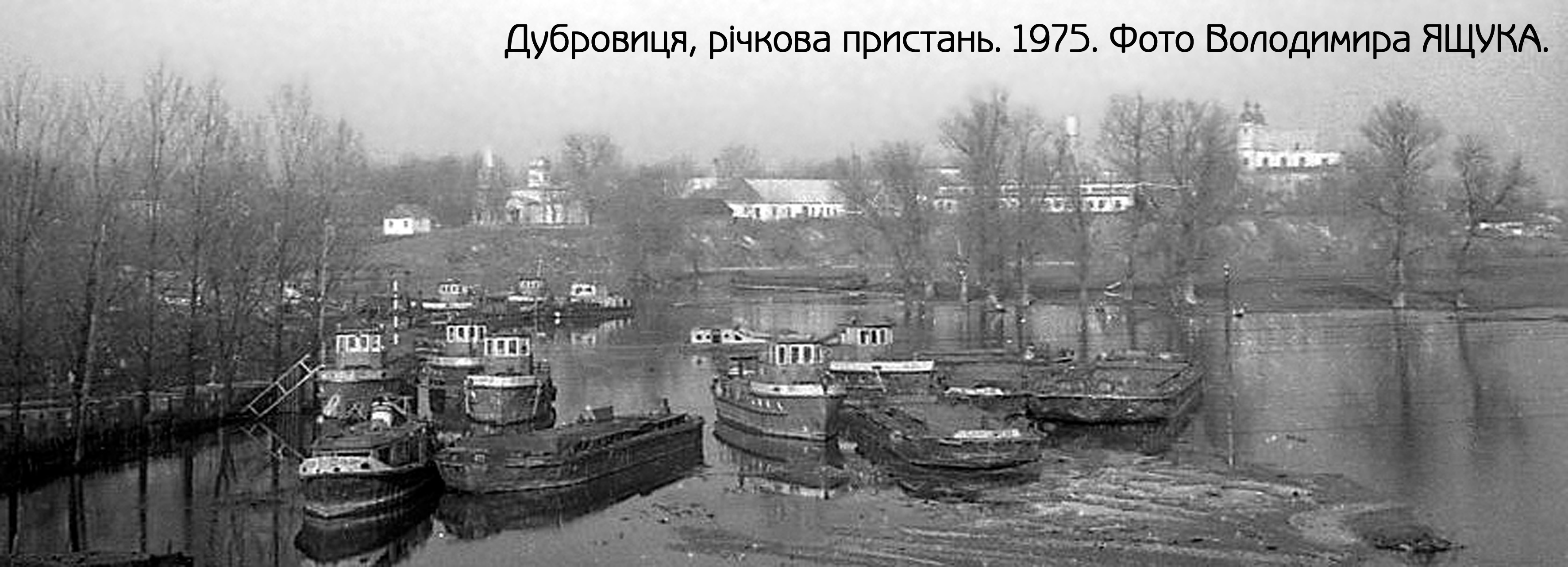 Дубровиця, річкова пристань на річці Горинь